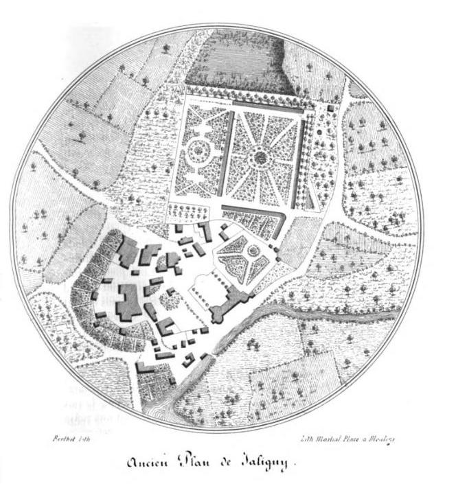 Ancien plan de Jaligny